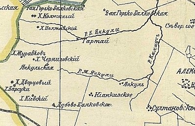 Фрагмент карты Ставропольской губернии 1909 года